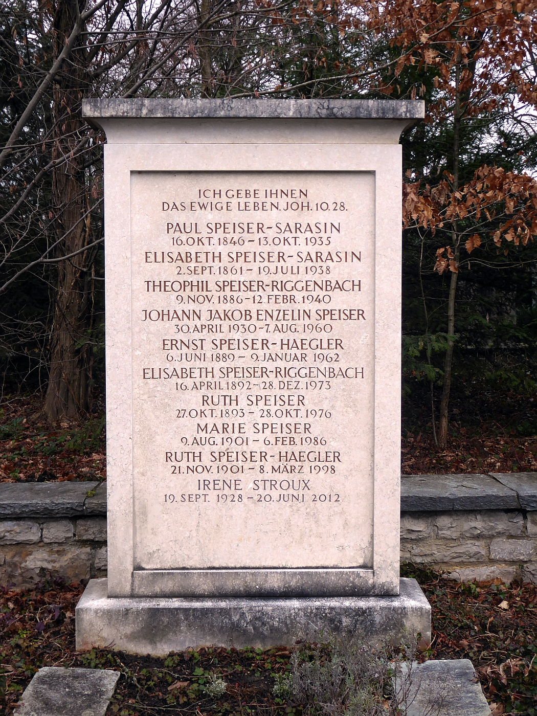 Ernst Speiser-Hägler (1889–1962) Kaufmann in Frankreich, England, im Fernen Osten und in den USA, Kaufmännischer Direktor der BBC, Politiker, Dr.iur.h.c. der Univ. Basel. Grab auf dem Friedhof Hörnli, Riehen, Basel-Stadt